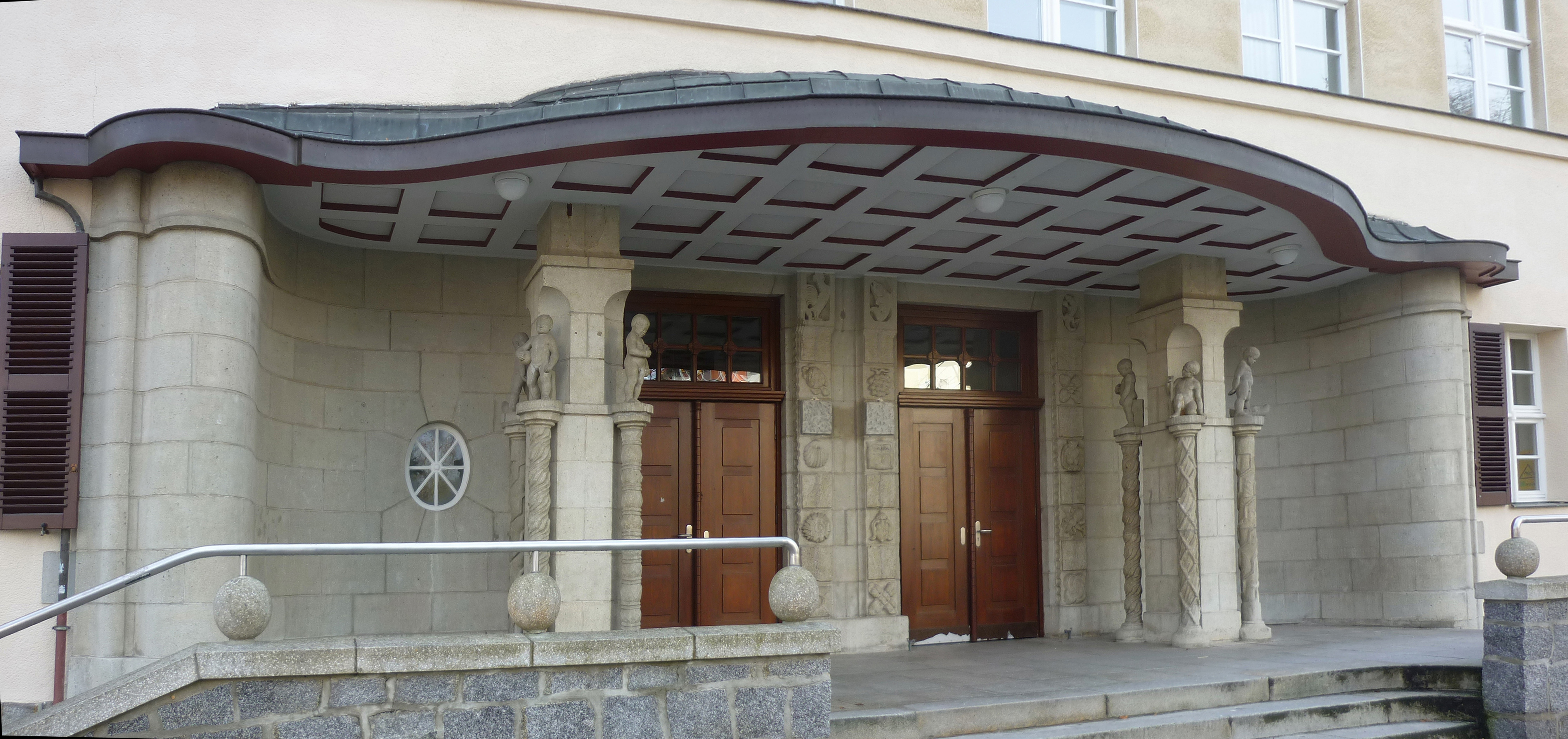 Sängerstadt-Gymnasium Finsterwalde, Eingang